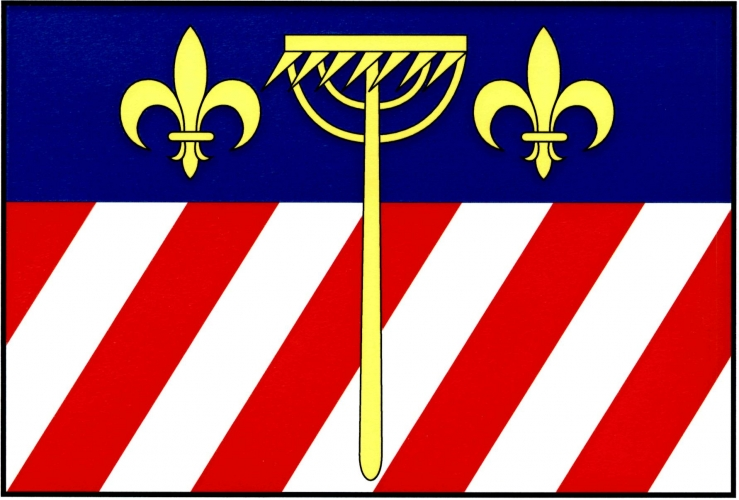 vlajka, Kosořín, okres Ústí nad Orlicí